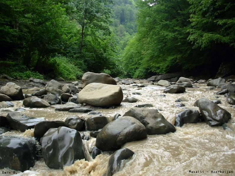 Горная река, Масаллы, Азербайджан